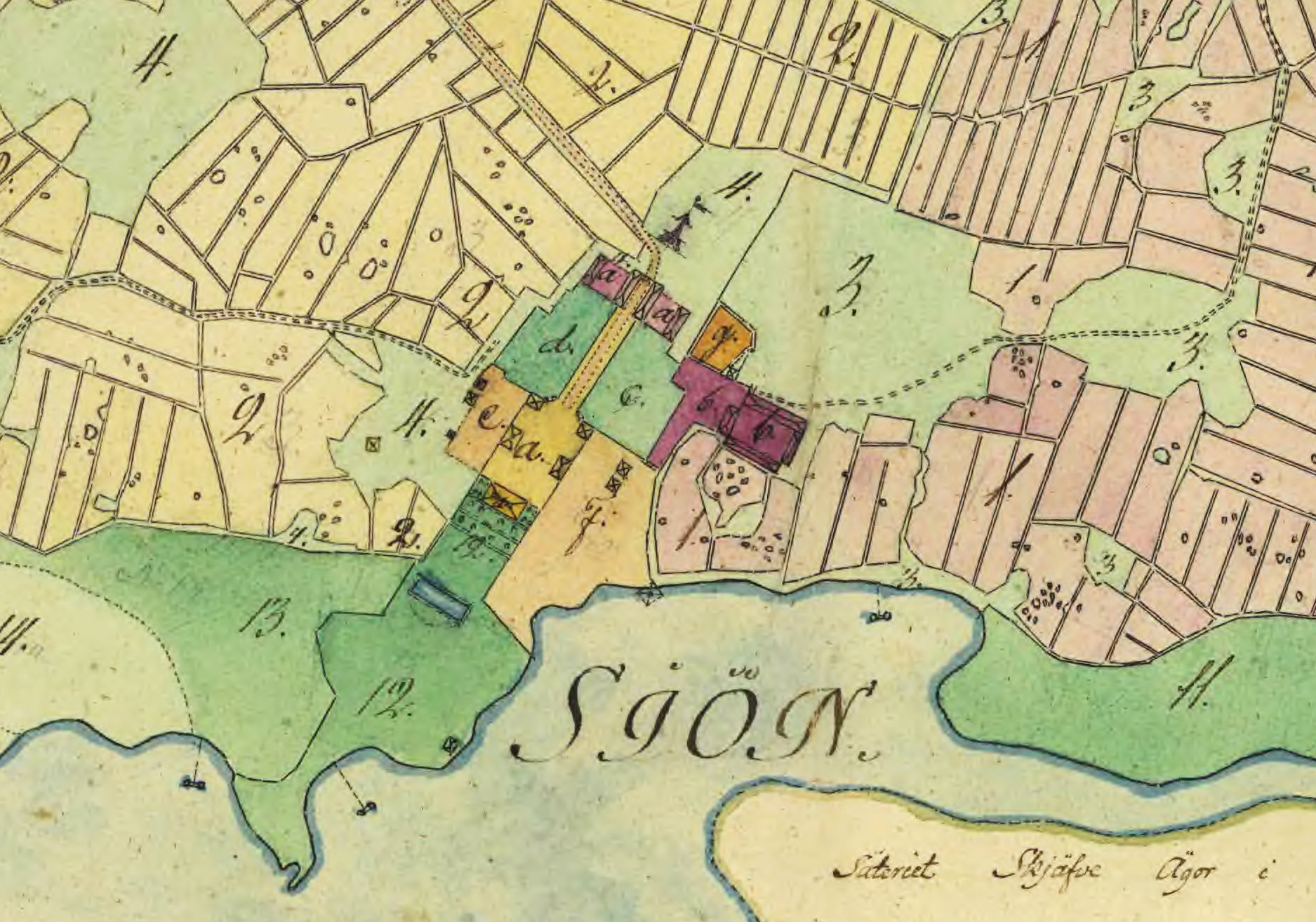 Mälby säteriets gårdsbebyggelse